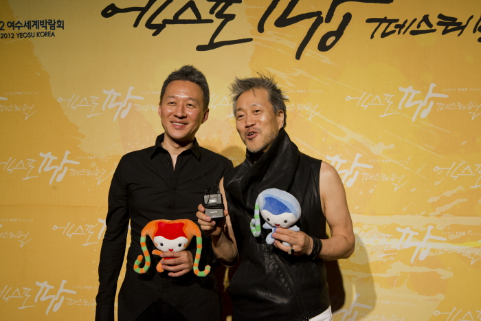 밴드 봄여름가을겨울